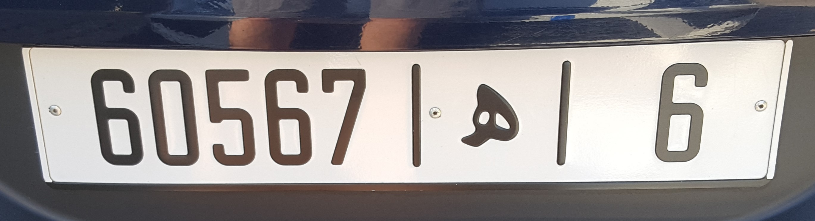 Autokennzeichen aus Marokko in Spanien